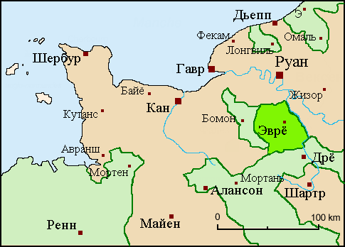 Графство Эврё в XIV веке